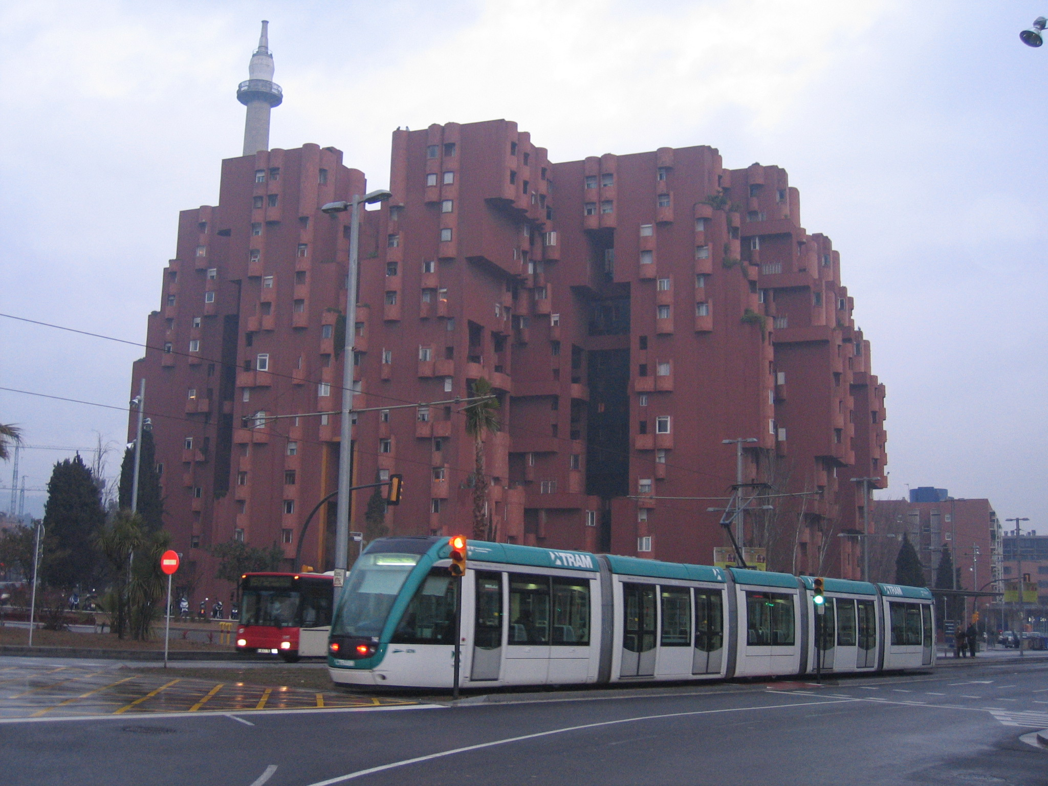 Descripció: El trambaix en front del edifici Walden.